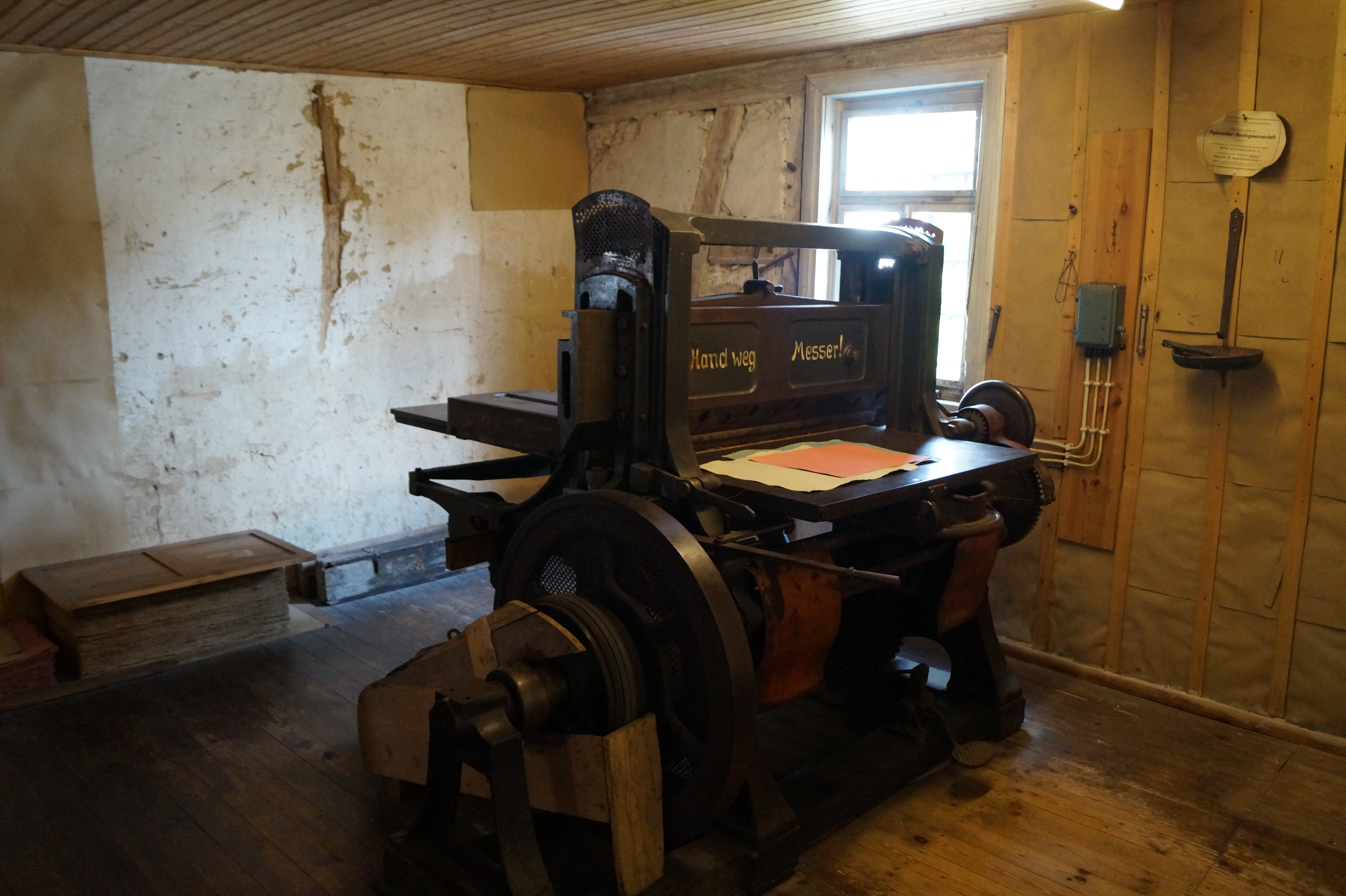 Papiermühle Homburg